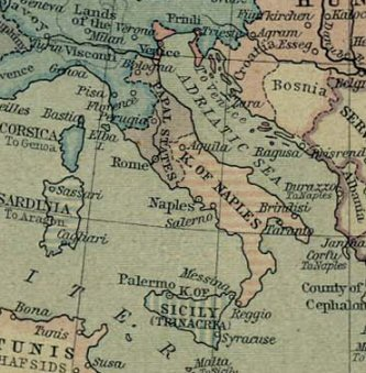 Koninkrijk Napels in 1360